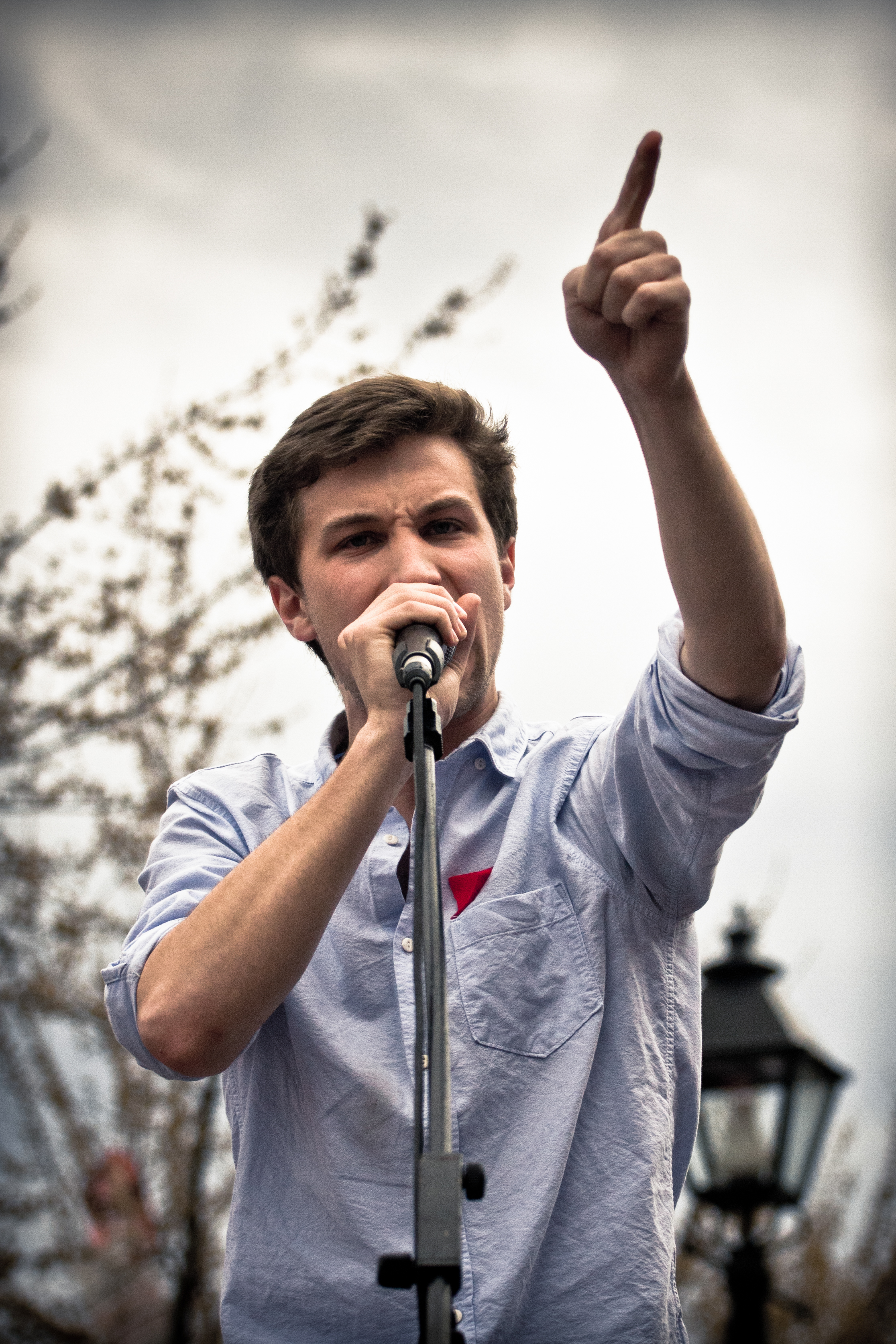 Gabriel Nadeau-Dubois, lors de la manifestation étudiante à la Place du Canada, Montréal, jeudi 22 mars.